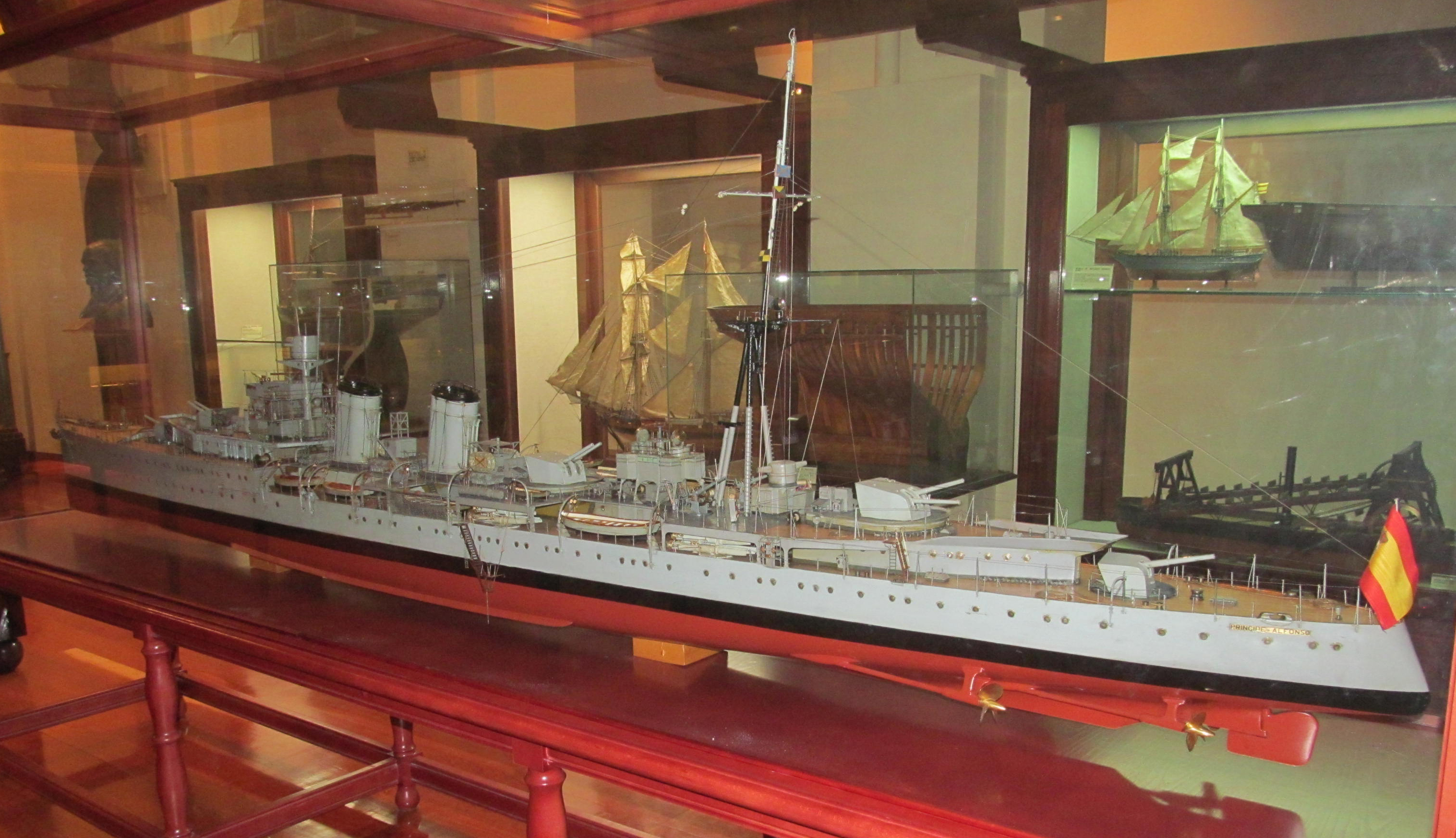 La maqueta del crucero Príncipe Alfonso, que también ostentó los nombres de Libertad y Galicia formaba parte de la clase Cervera, se encuentra en el Museo Naval, Madrid.